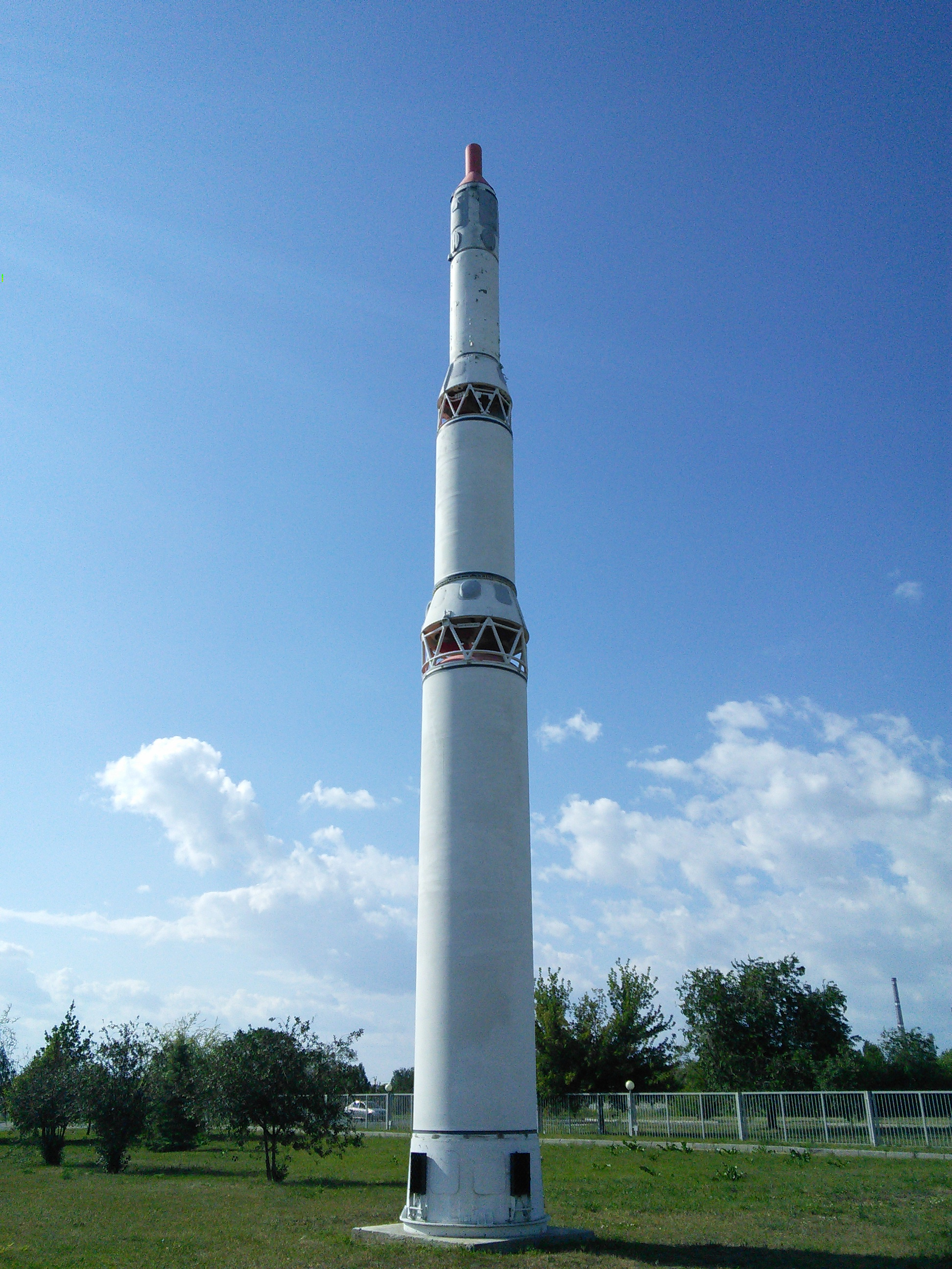 Межконтинентальная баллистическая ракета РТ-2П, находящаяся в парковом комплексе истории техники имени К. Г. Сахарова